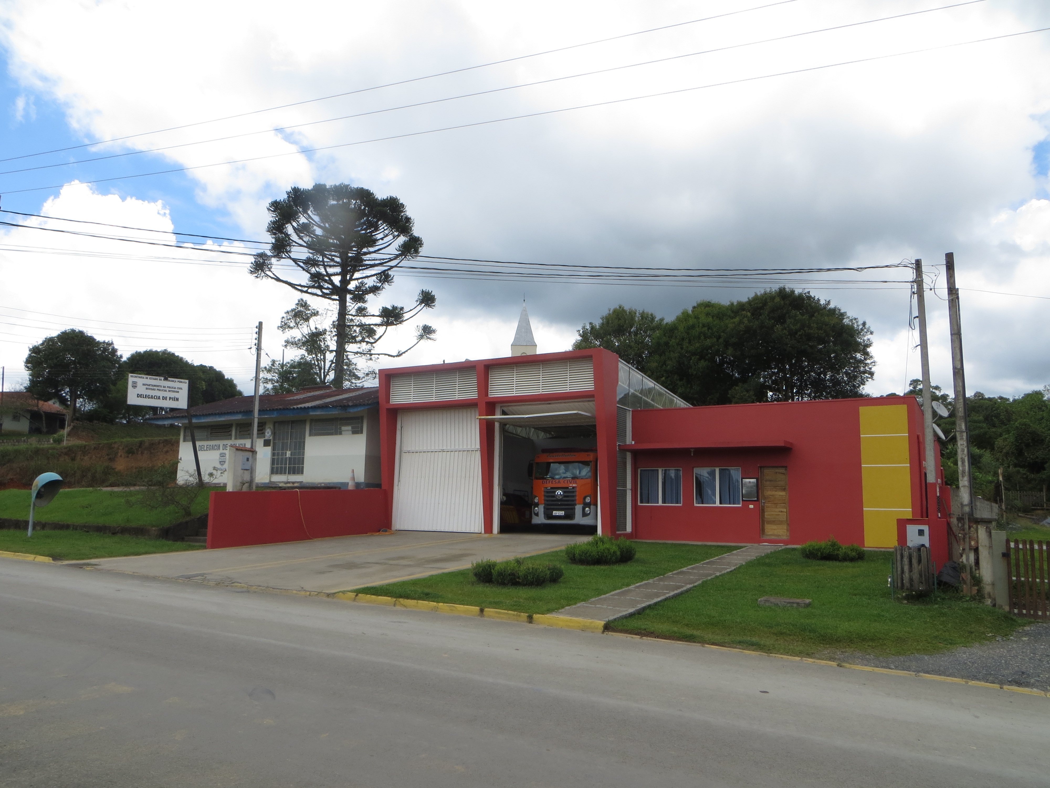 Corpo de Bombeiros de Piên, Estado do Paraná, Região Sul do Brasil.